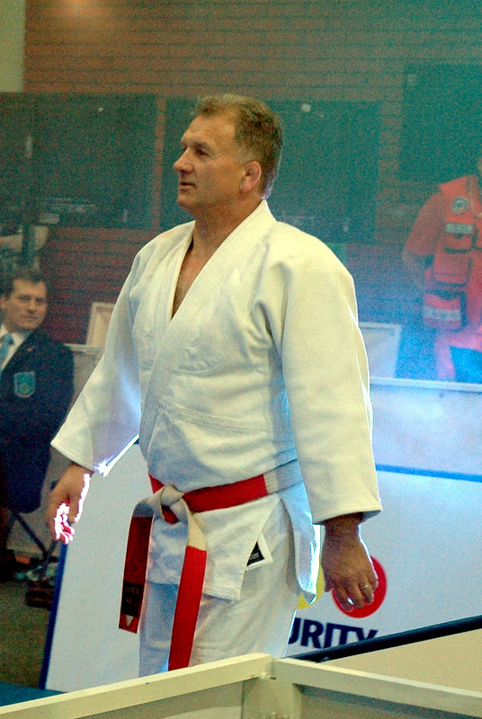 Adam Adamczyk podczas "Treningu z Mistrzem" 25 lutego 2012 roku - Warszawa.